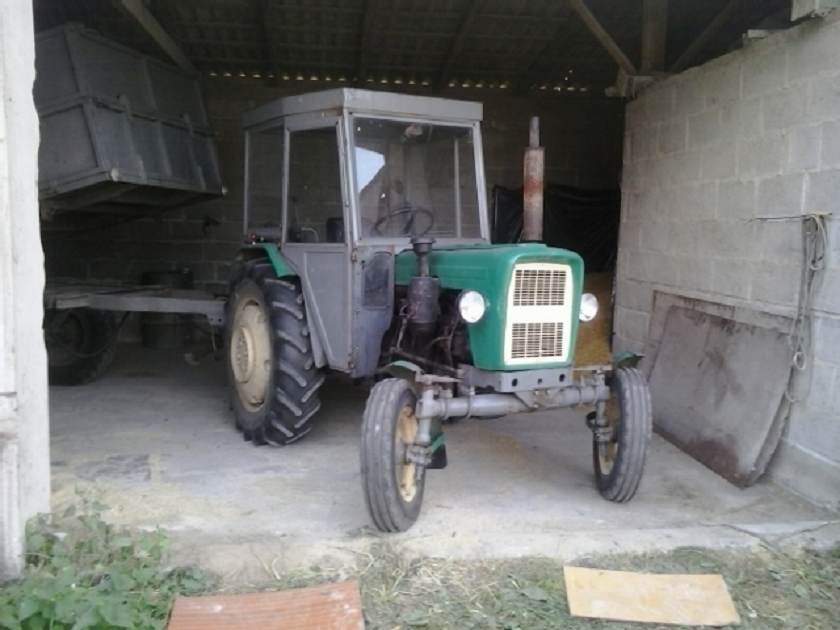 Ursus